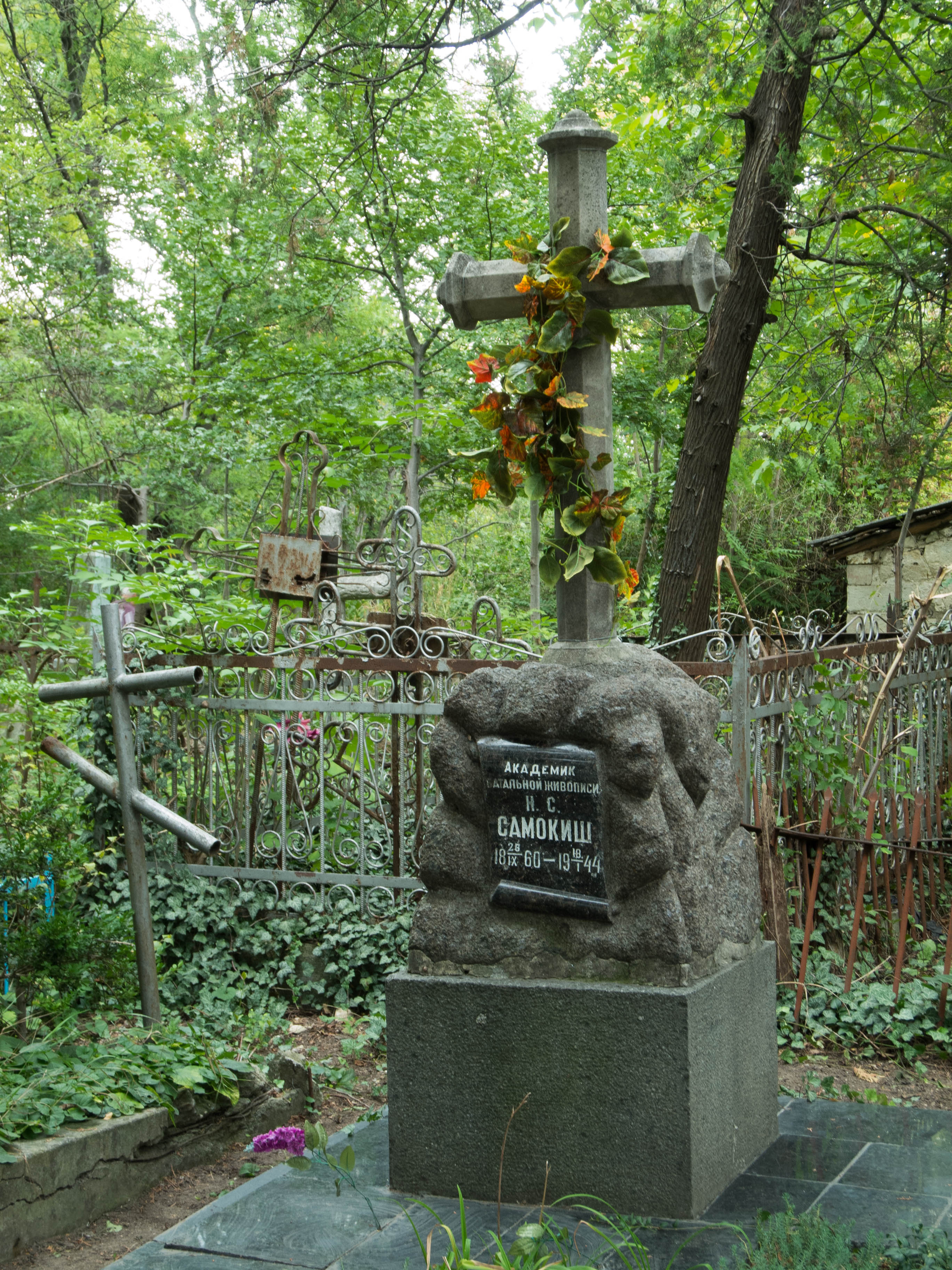 Могила живописця-баталіста М.С. Самокиша, Сімферополь, пр. Кірова, 1-е цивільне кладовище, сектор № 1